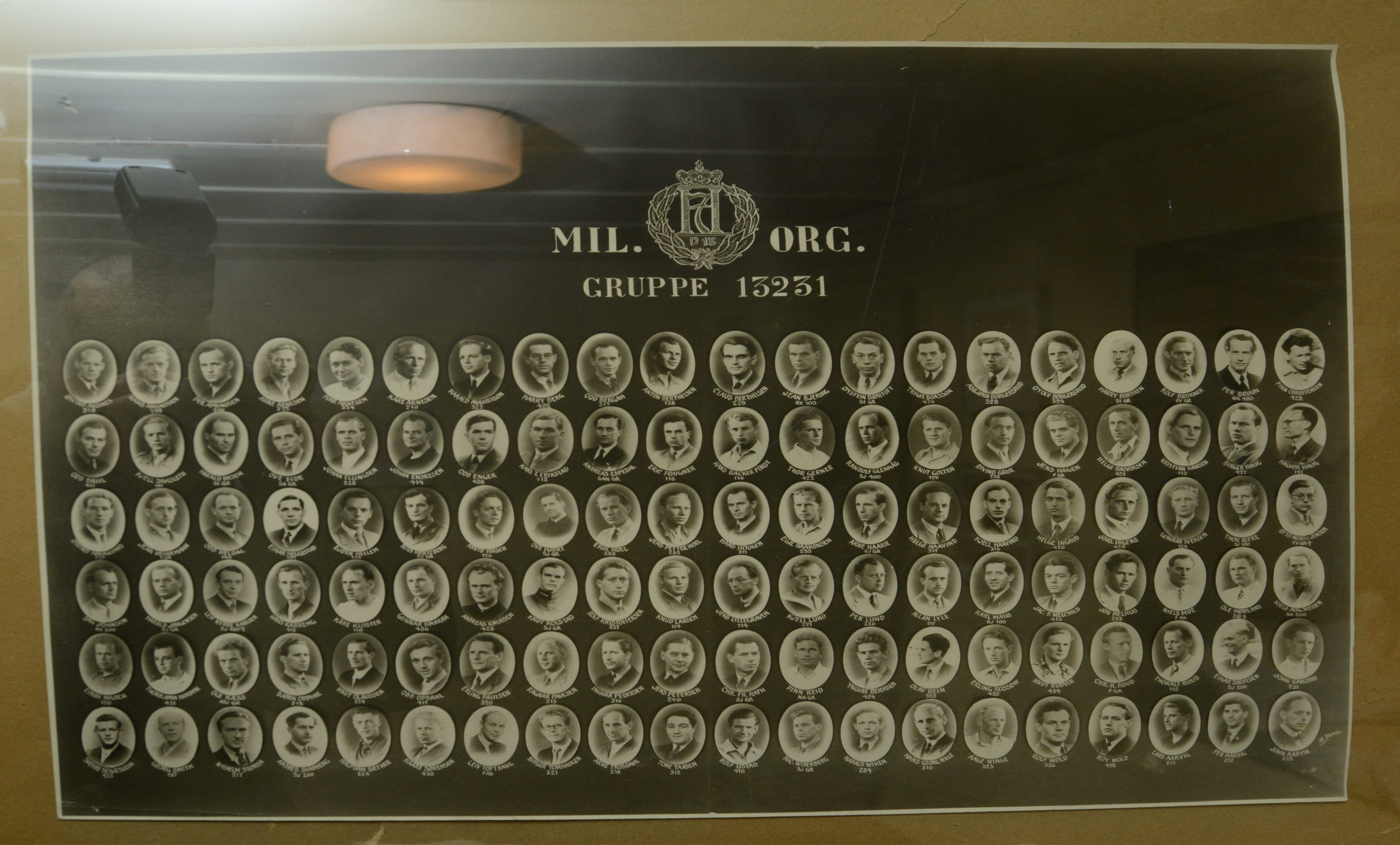 Bunkeren i under Oslo handelsgymnas i parkveien 65